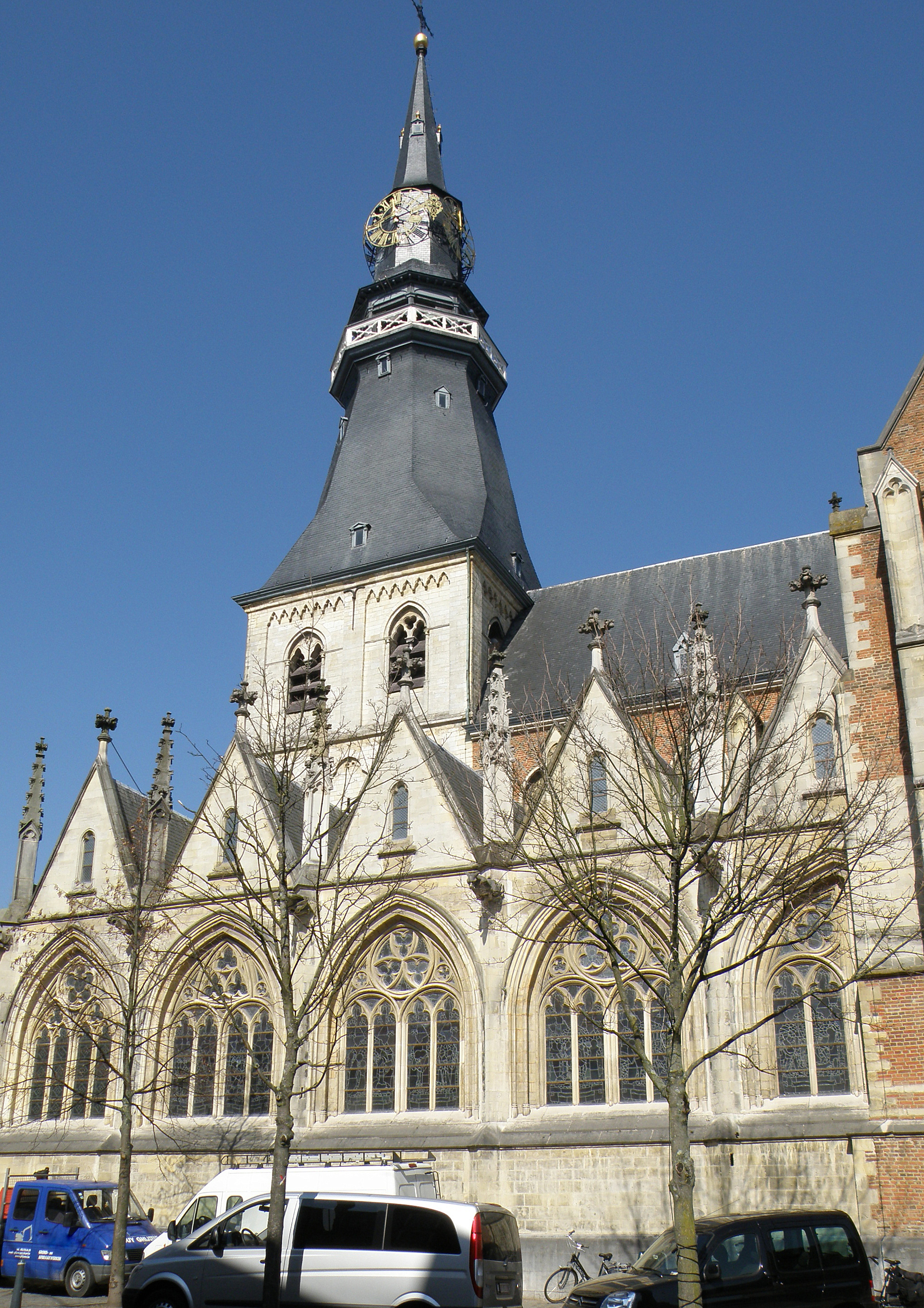 Hasselt (prov. Limburg, België). Sint-Quintinuskathedraal, zuidel. flank.